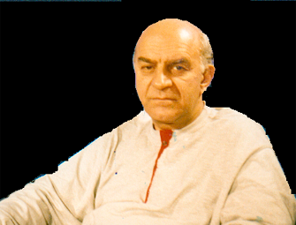 Portrait d'Alecos Fassianos.